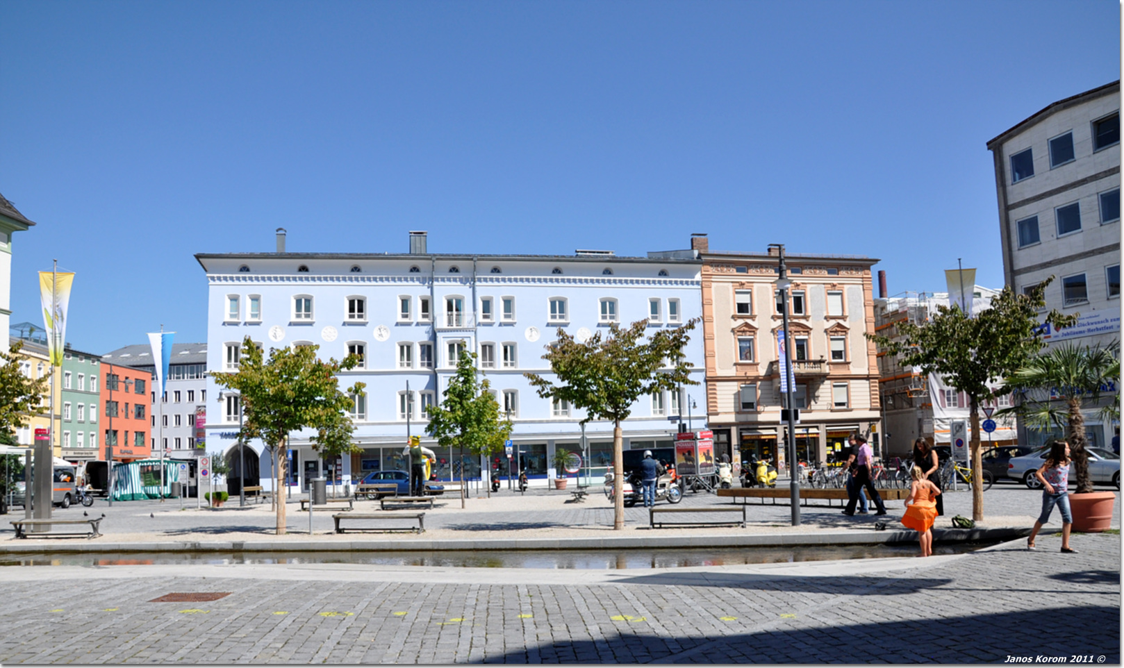 Ludwigsplatz Rosenheim